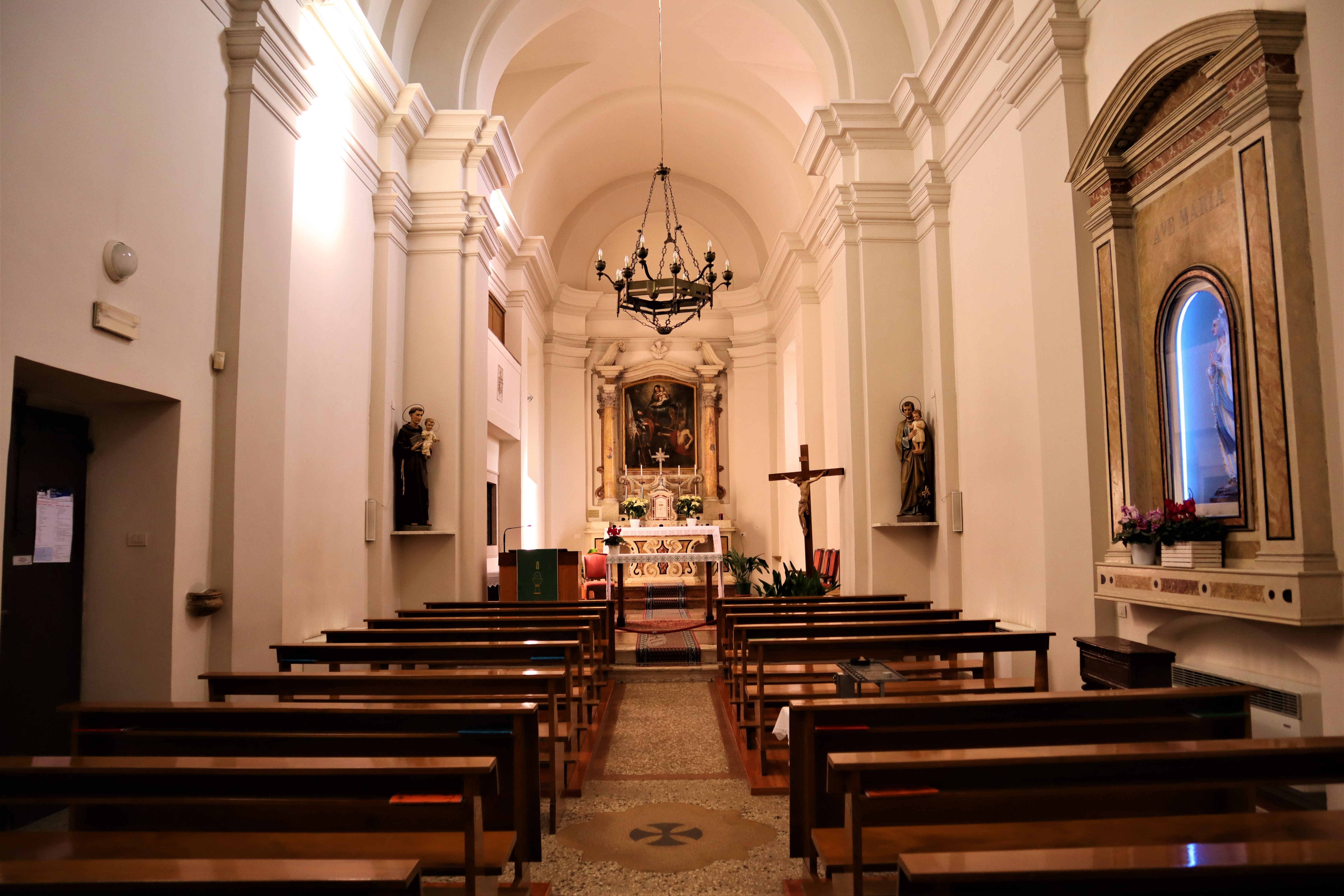 Chiesa di Sant'Alessandro a Riva del Garda. Interno.